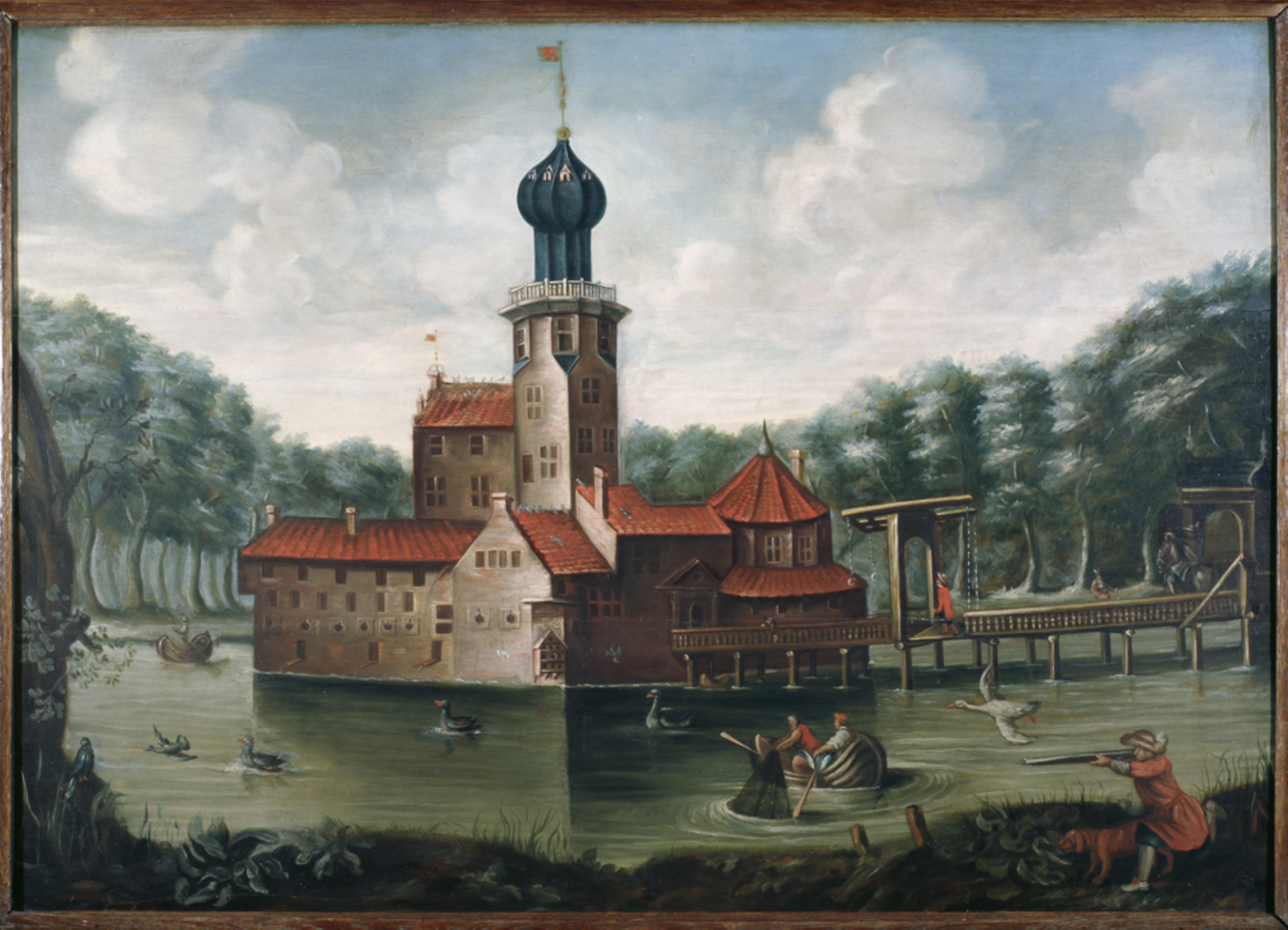 Waarschijnlijk 18e eeuws schilderij van de borg Ewsum vóór 1649, toen de borg ingrijpend verbouwd werd.